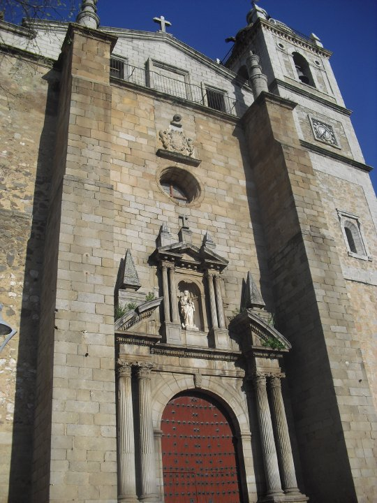 Fachada de la Iglesia Parroquial de Santiago, del siglo XVI.